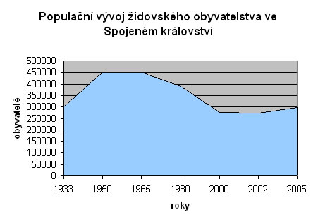 Graf populačního vývoje židovského obyvatelstva ve Spojeném království